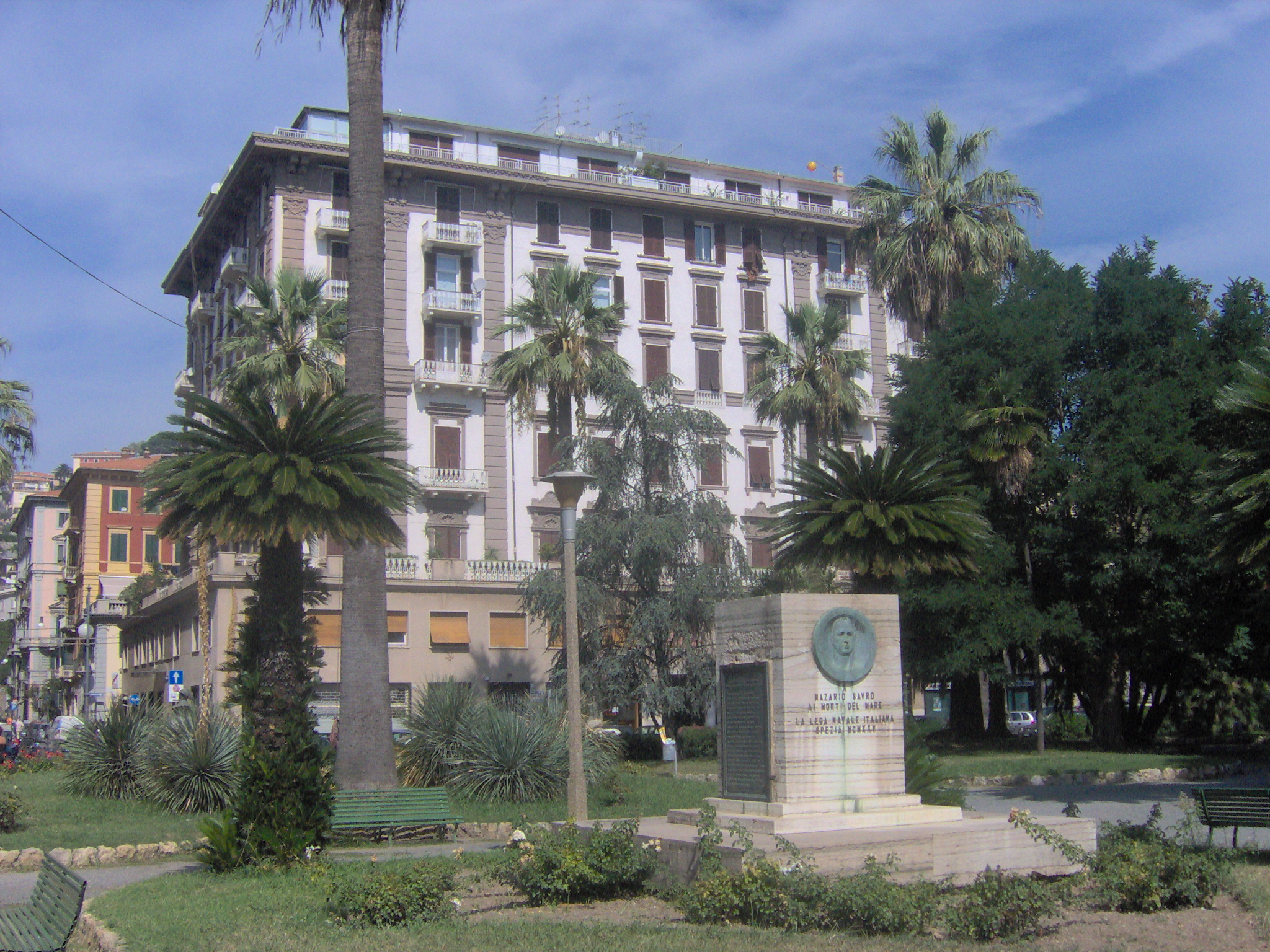 L'ex Hotel Croce di Malta presso i Giardini Pubblici.